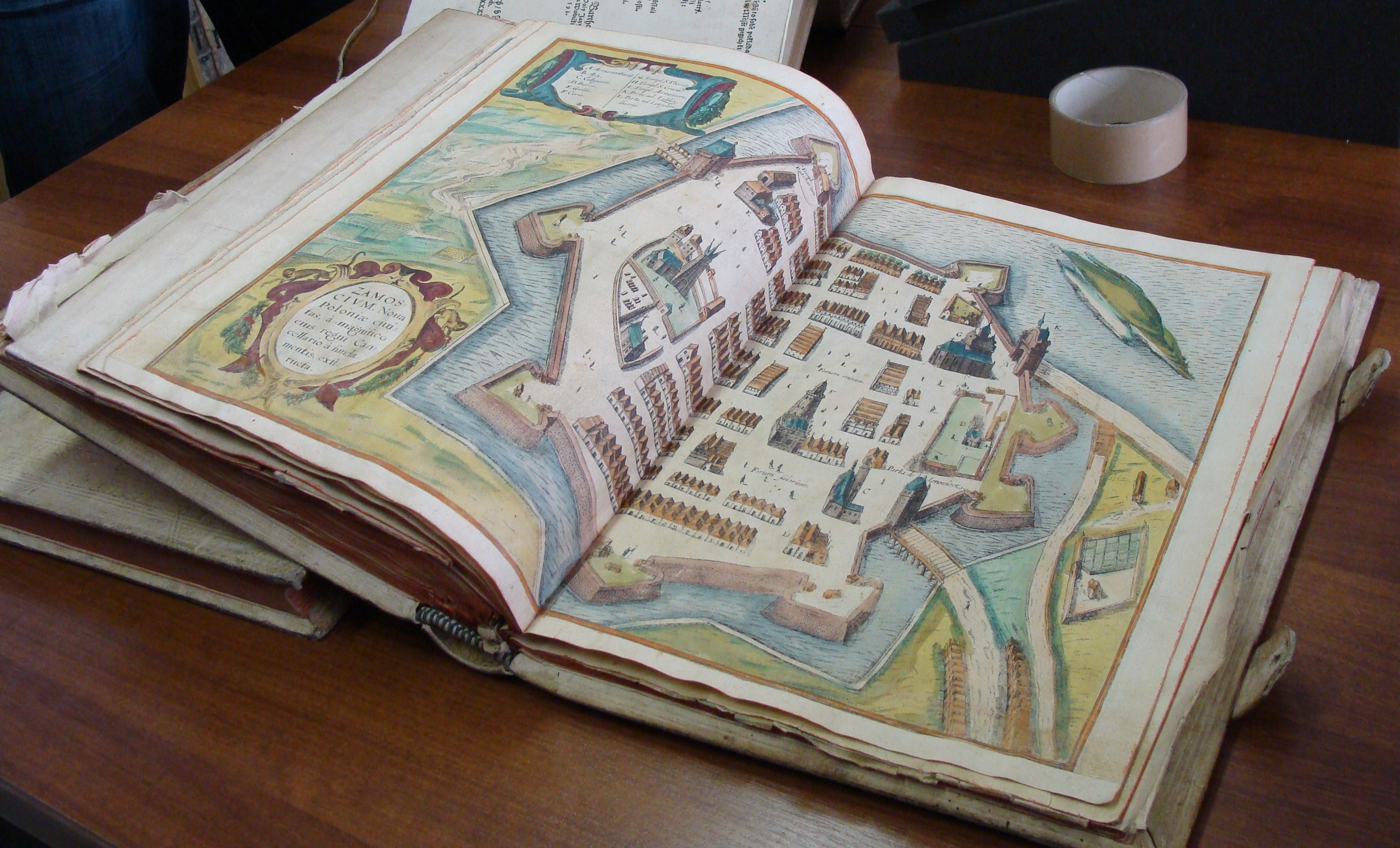 Atlas G. Brauna i F.Hogenberga (1617) - widok Zamościa (jeszcze wg projektu)